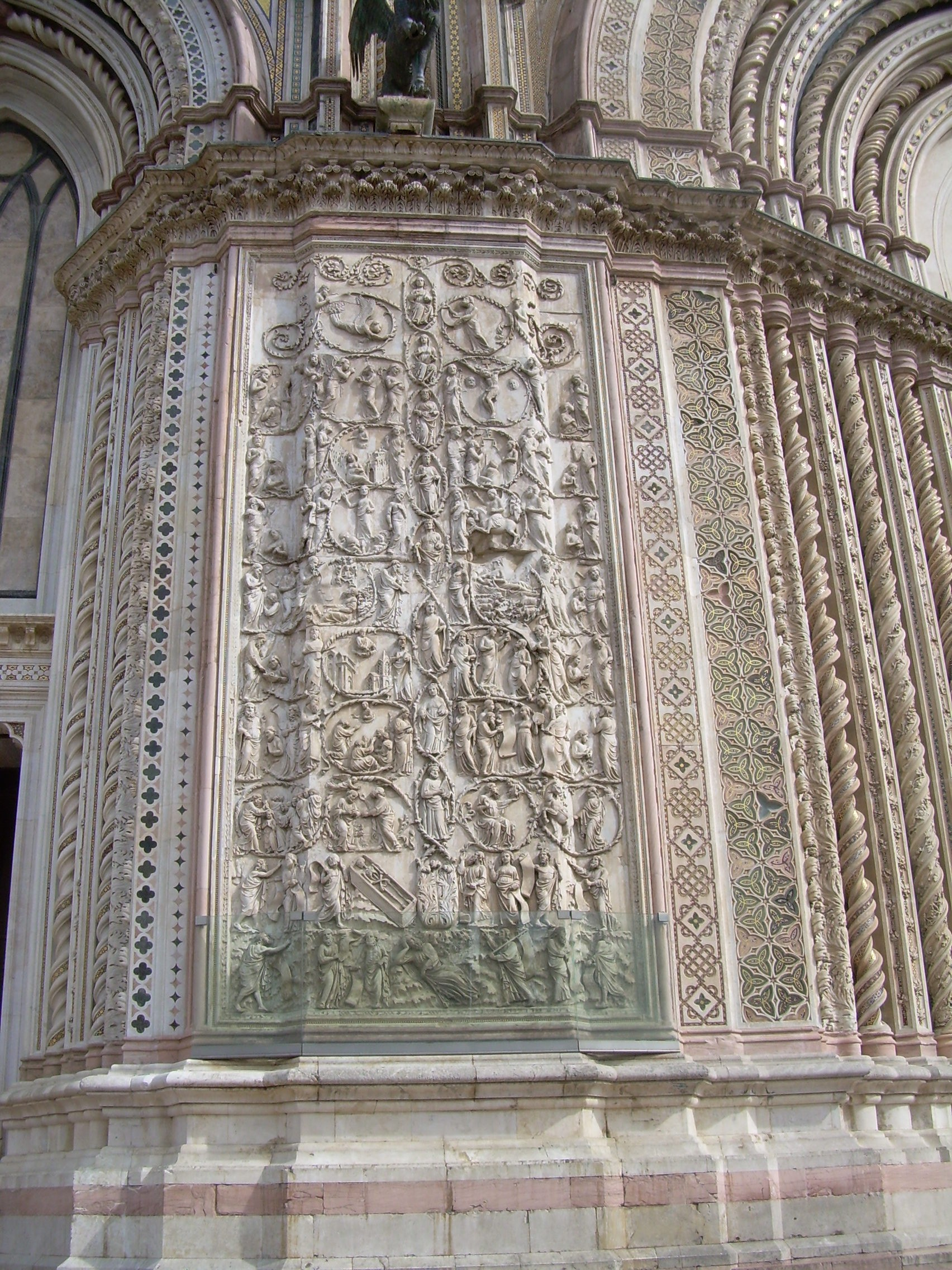 Orvieto_Duomo_Deuxième pilier gauche.JPG